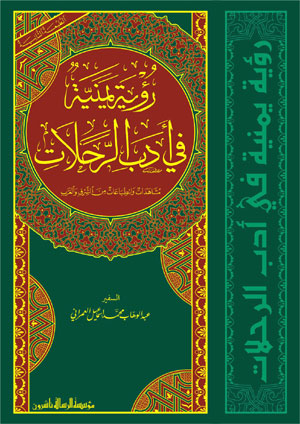 رؤية يمنية في آداب الرحلات